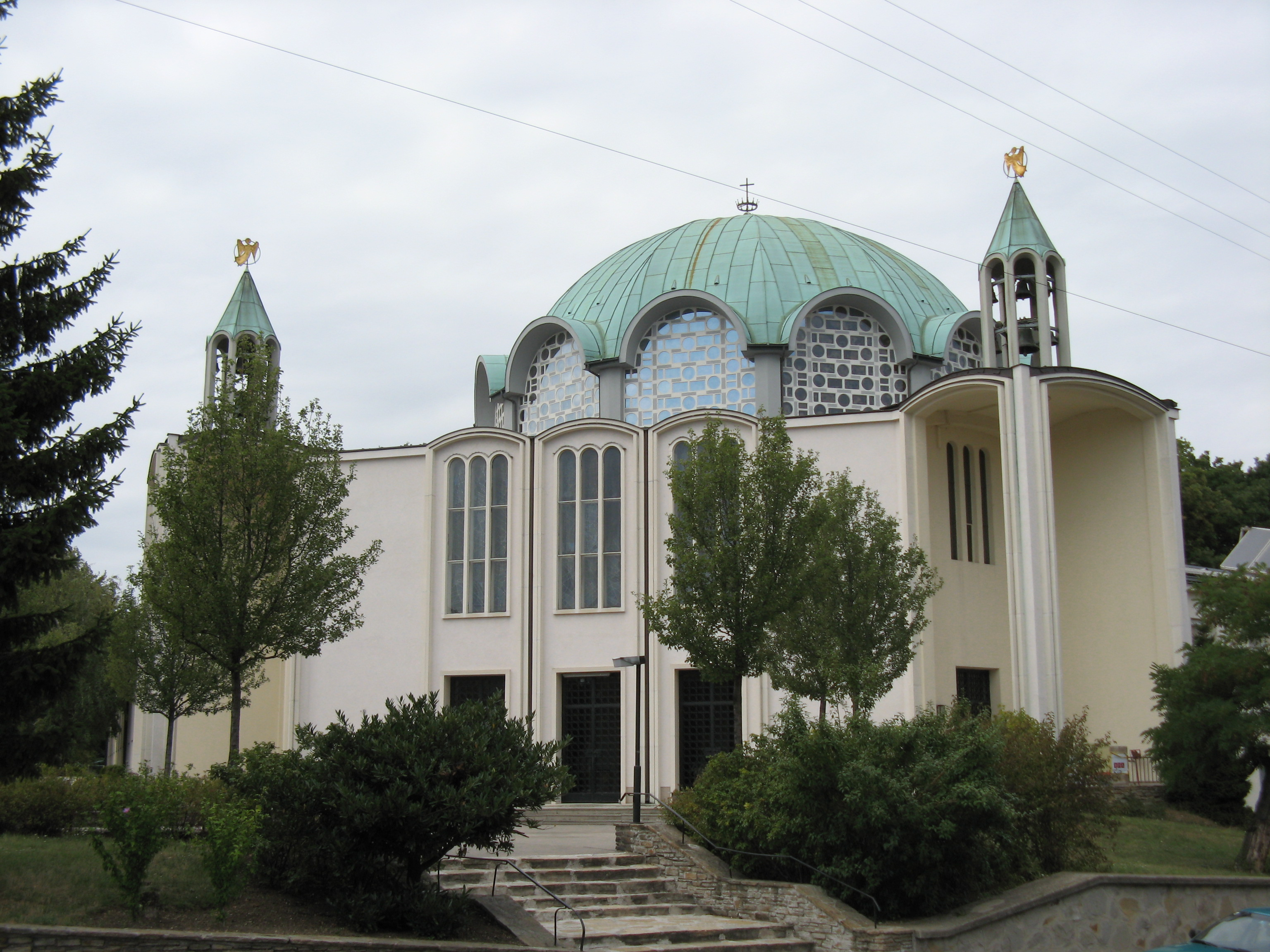 Gatterhölzl-Kirche in Wien-Meidling